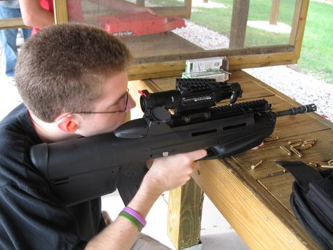 Semi automatic rifle FN FS2000